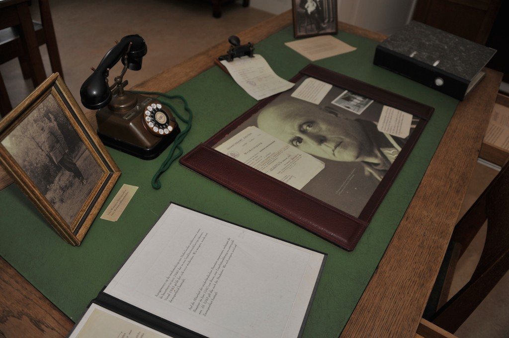 Bureau van de Duitse Ortskommandant in het pand Markt 12 te Aalten, thans het Nationaal Onderduikmuseum.